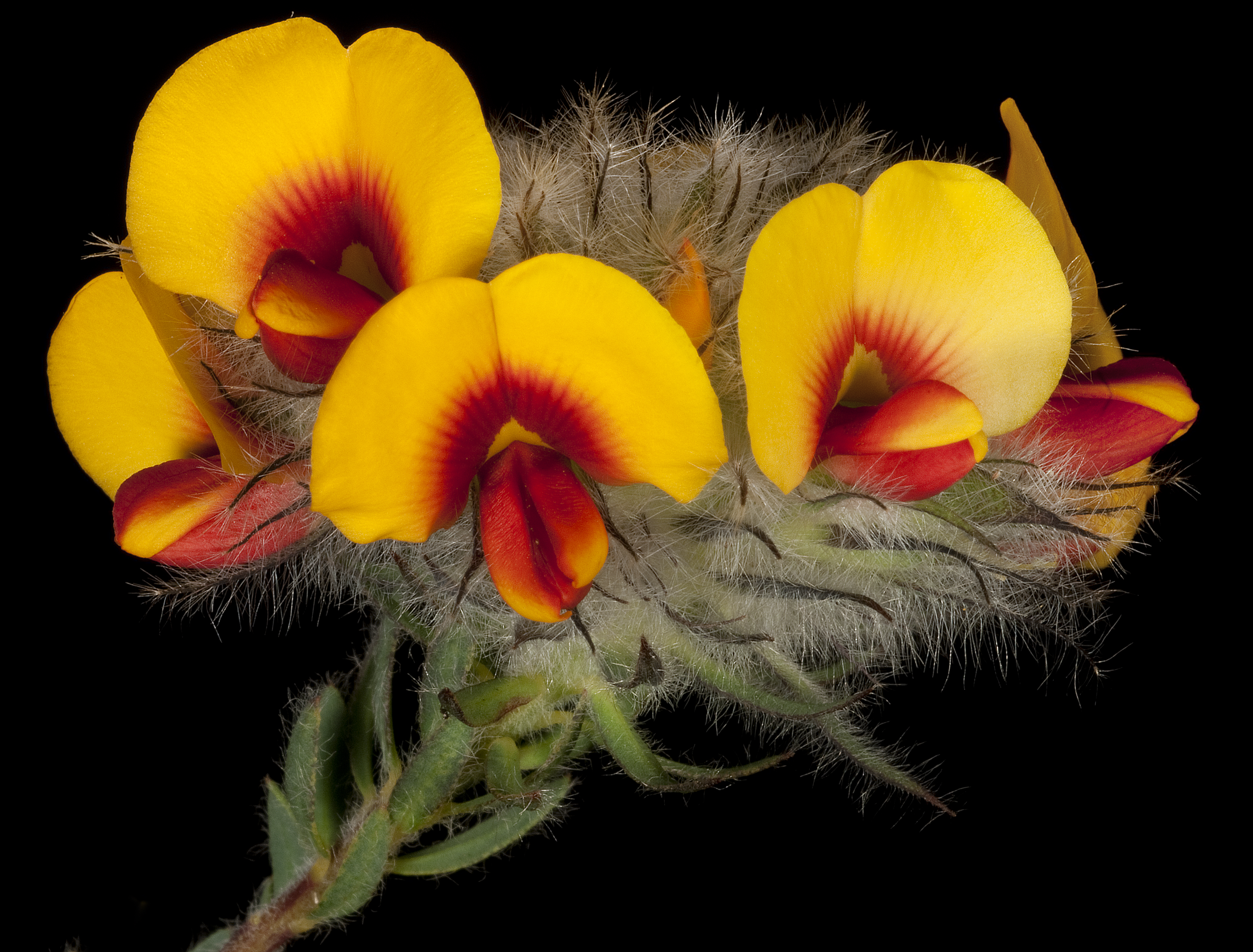 PERTH7774982